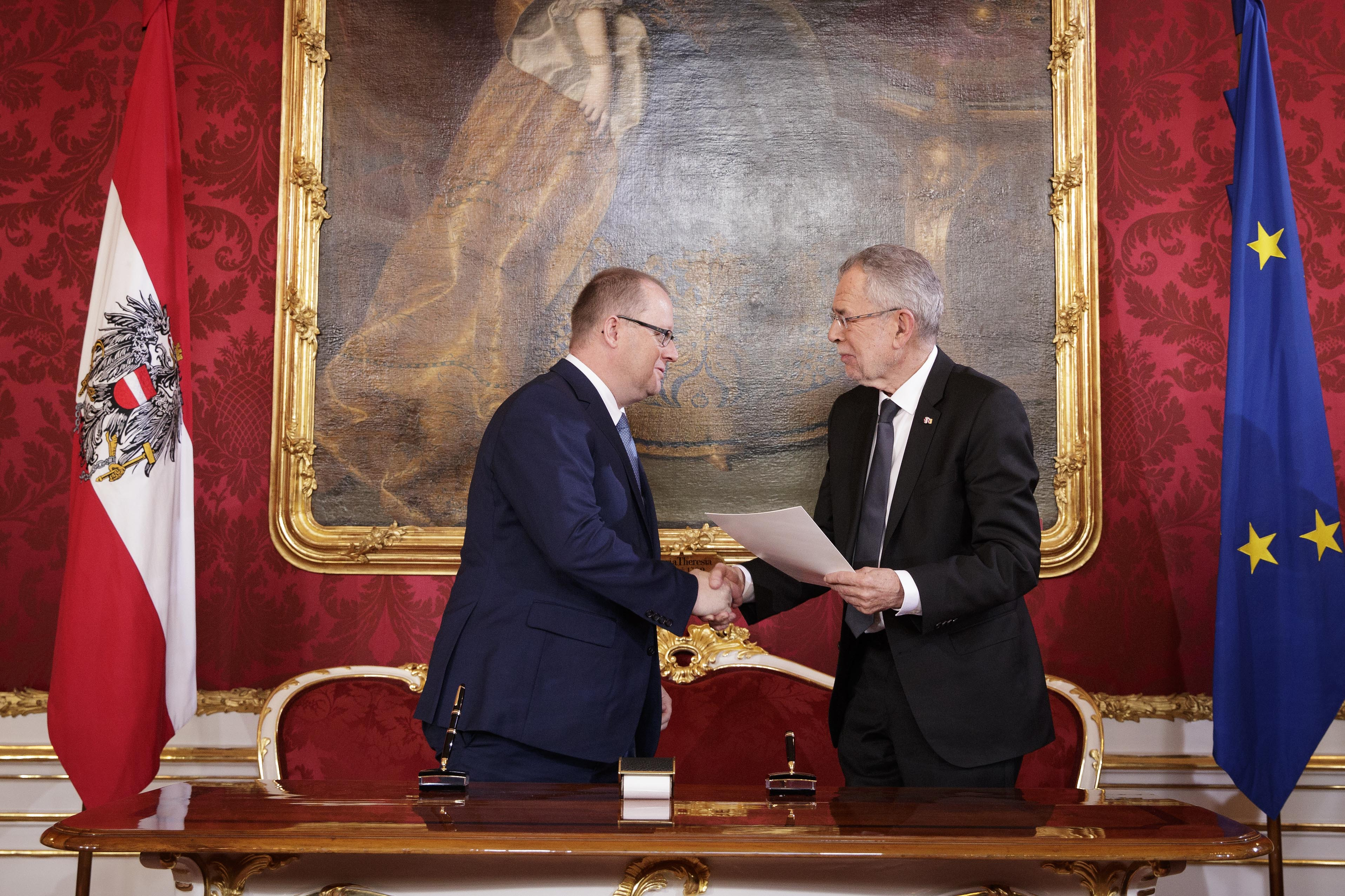 Ernennung und Angelobung der neuen Bundesregierung und der neuen Staatssekretäre im Maria Theresien-Zimmer durch Bundespräsident Alexander Van der Bellen am 18 12 2017. Fotocredit: Peter Lechner/HBF